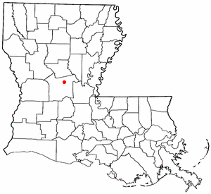 map